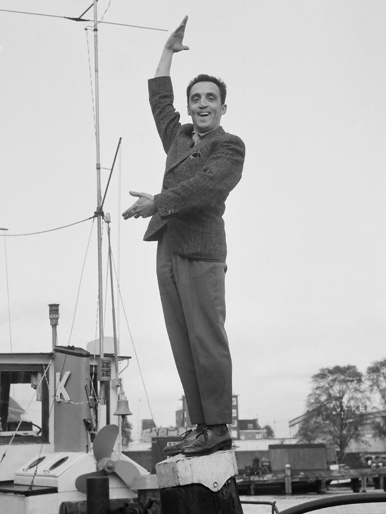 Rob van Reyn. Op ducdalf 8 oktober 1961